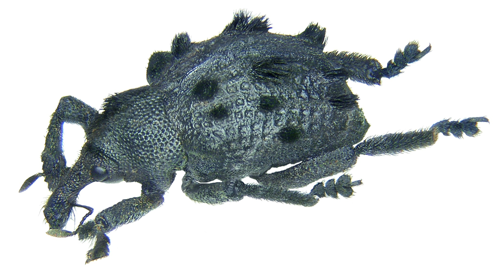 Familie: Curculionidae Grösse: 13 mm Fundort: Indonesien, Halmahera, Jailolo leg.det. A.Skale, 2006 Foto: U.Schmidt, 2007